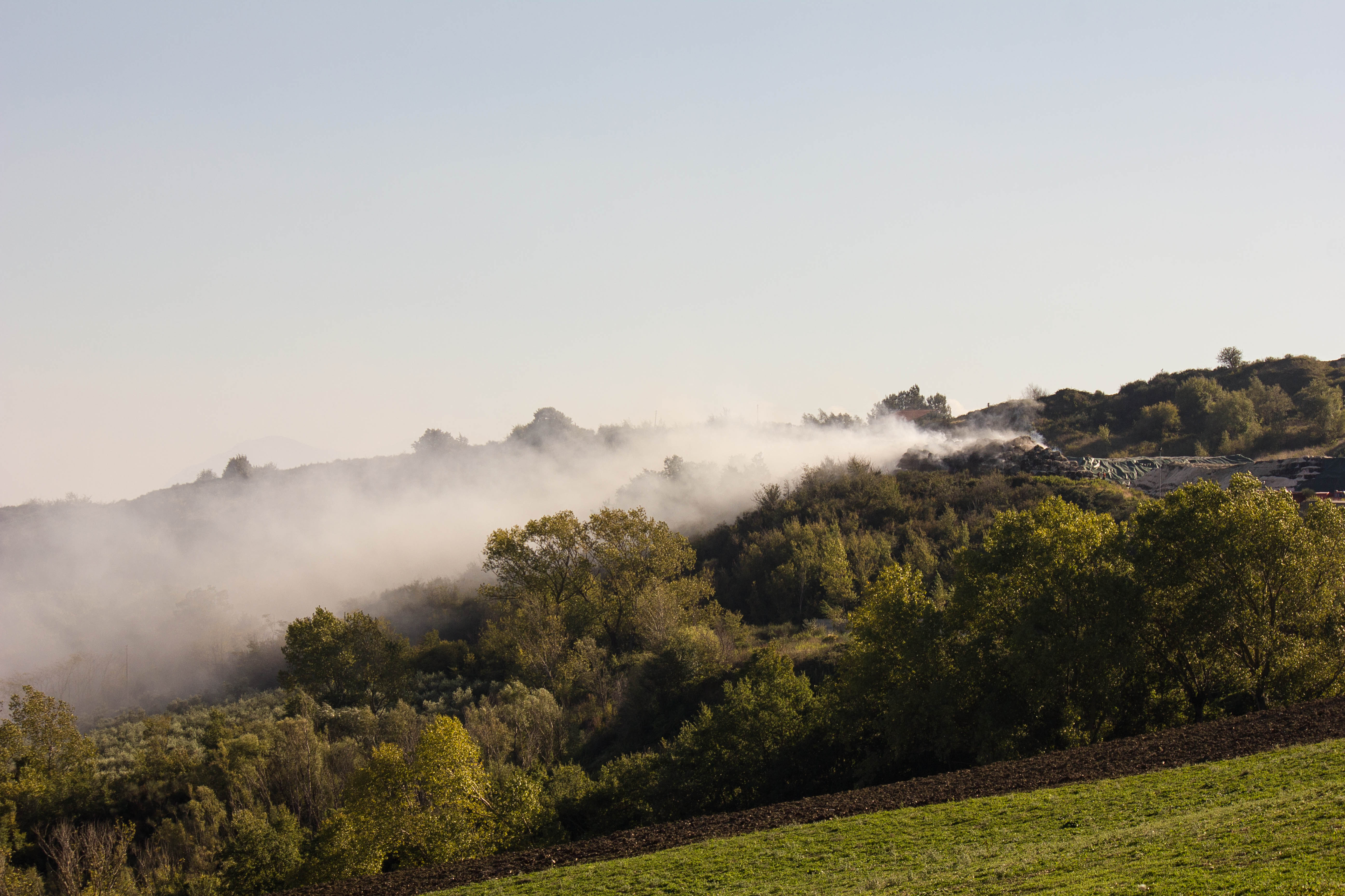 Fumo.